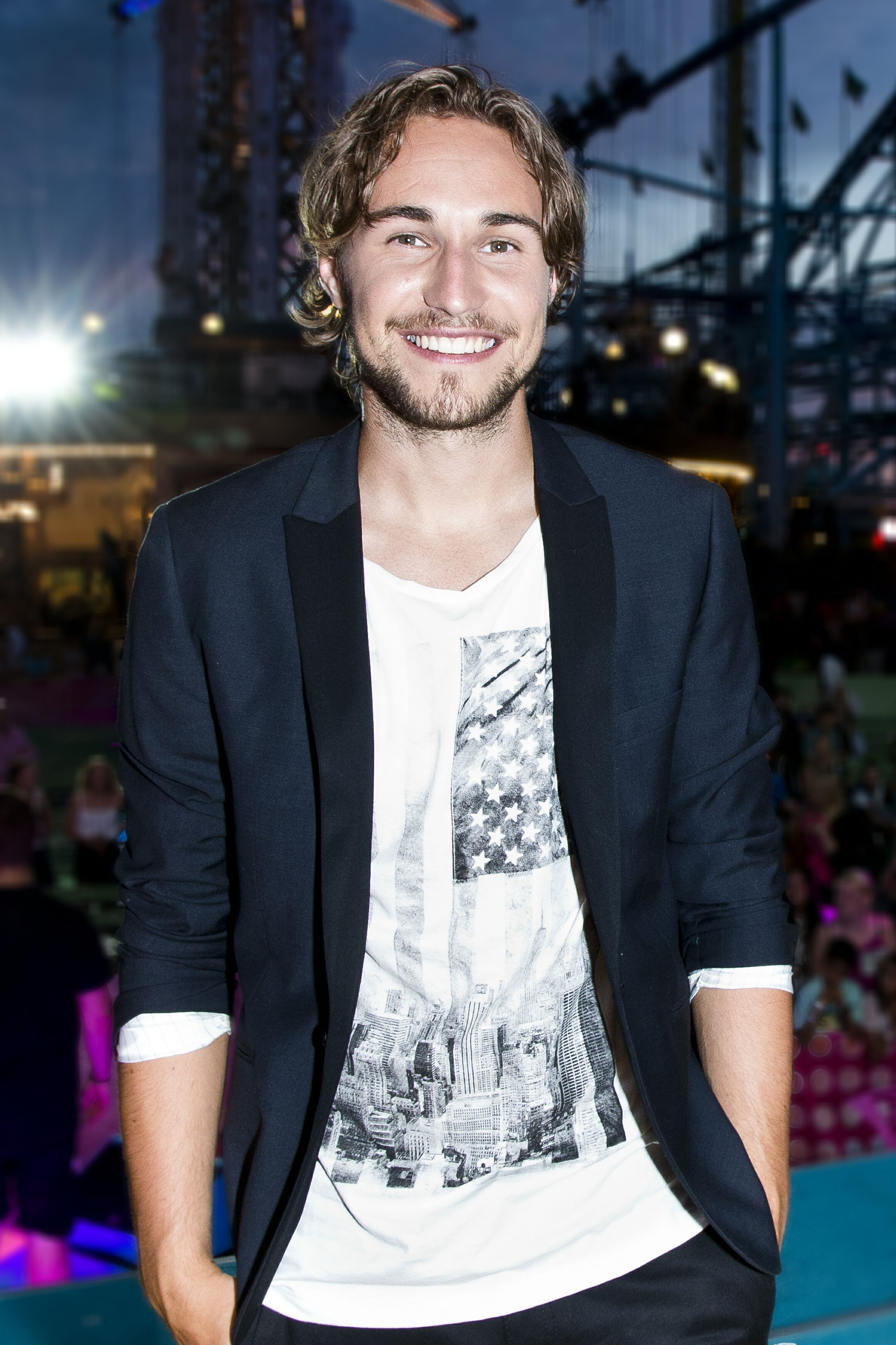 Kevin Walker på Sommarkrysset